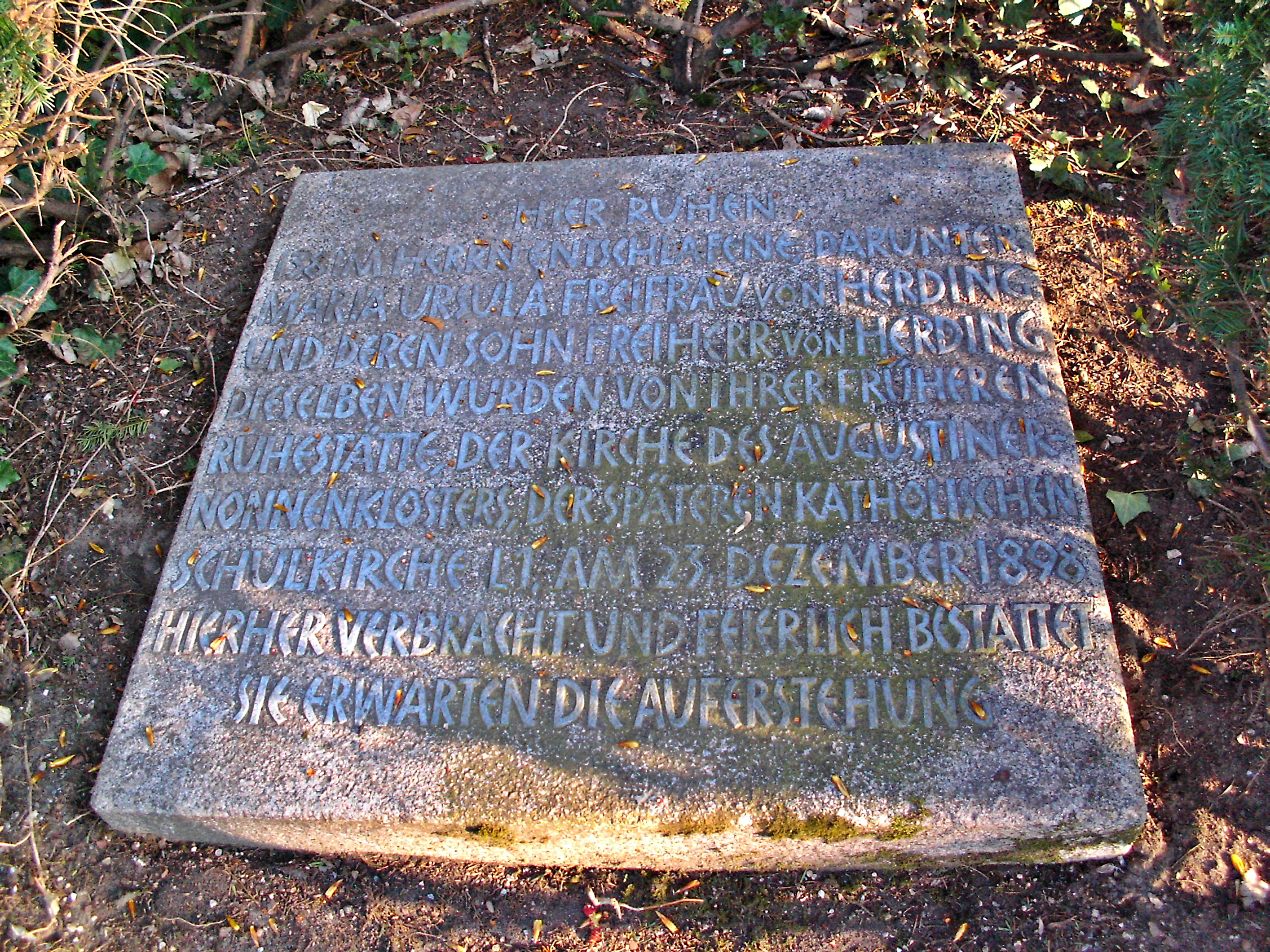 Mannheim Hauptfriedhof, Grab der Freifrau Josepha Ursula von Herding (1780-1849)